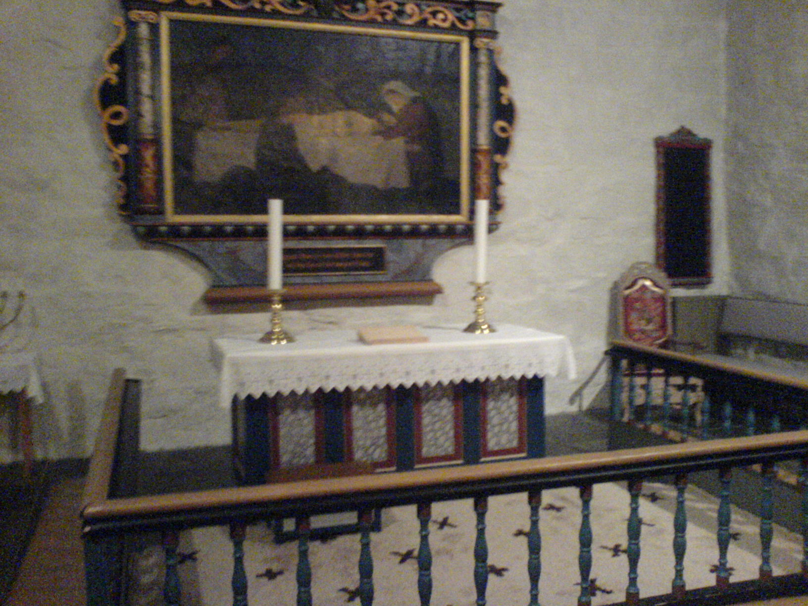 Alteret i Ørland kirke, Sør-Trøndeløag, Norway